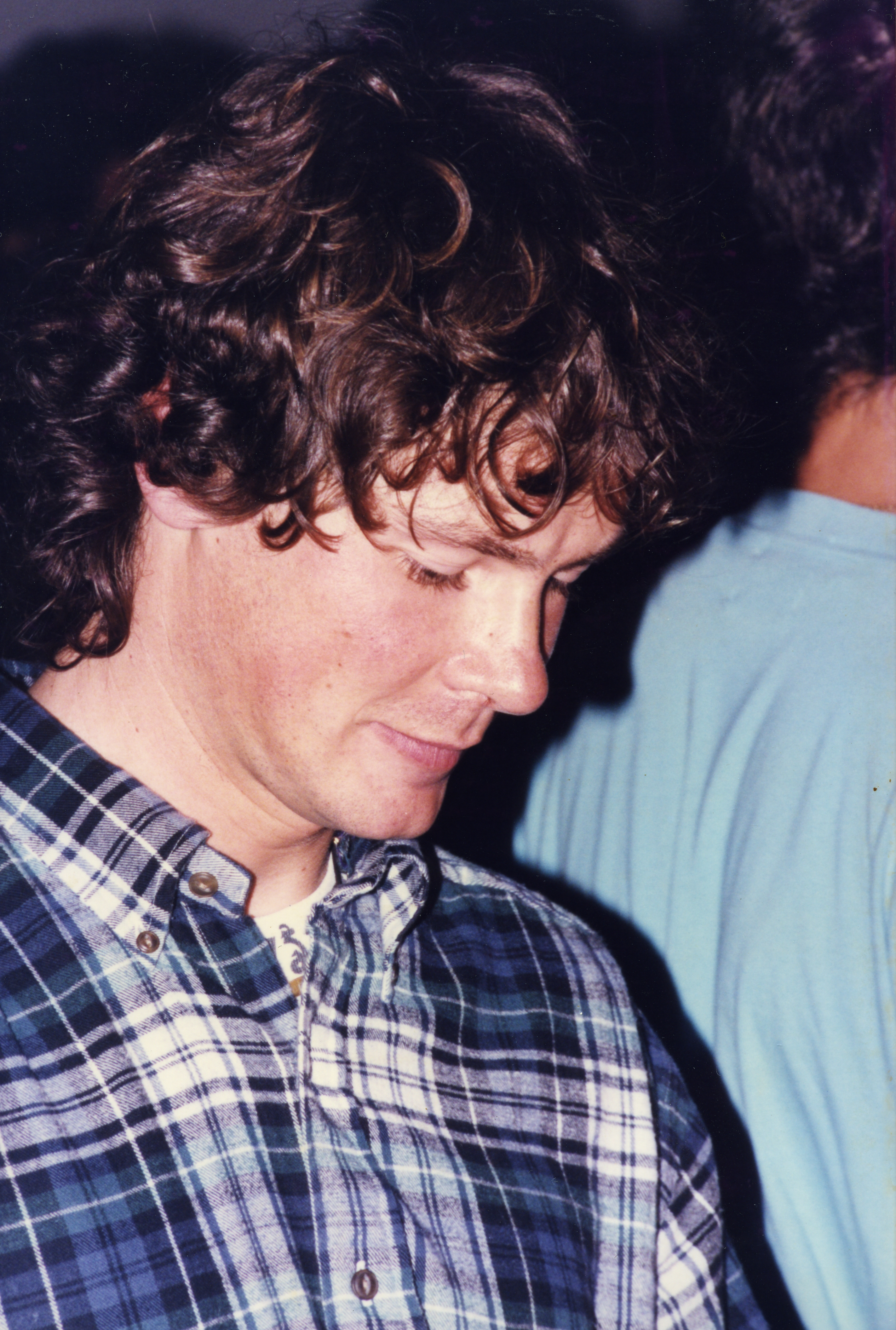 Euskalduna mendigoizale taldeak antolatutako XXXIII. Mendi astearen baitan. Aiurri 24 zbk. 13. orr